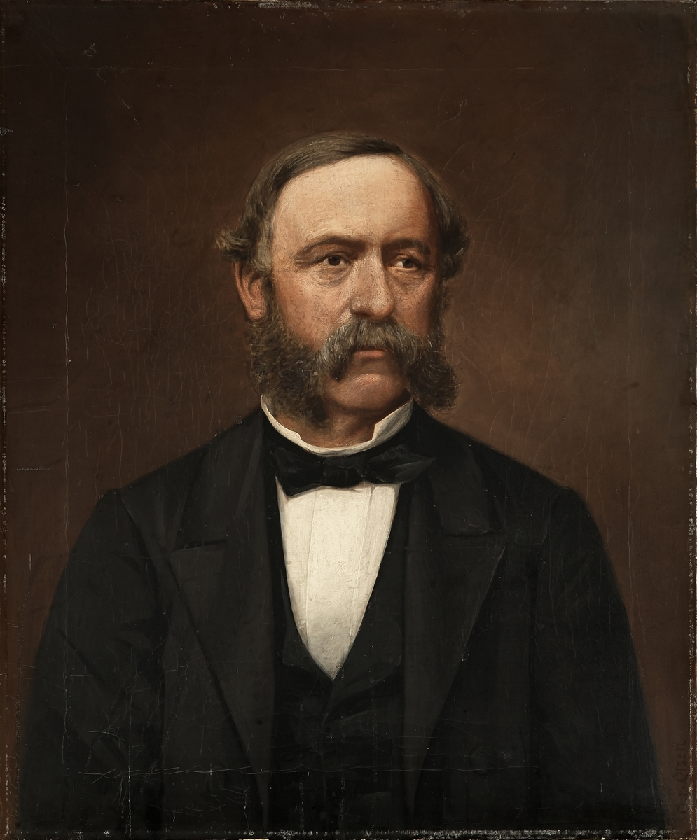 Portrett av havnedirektør Oluf N. Roll